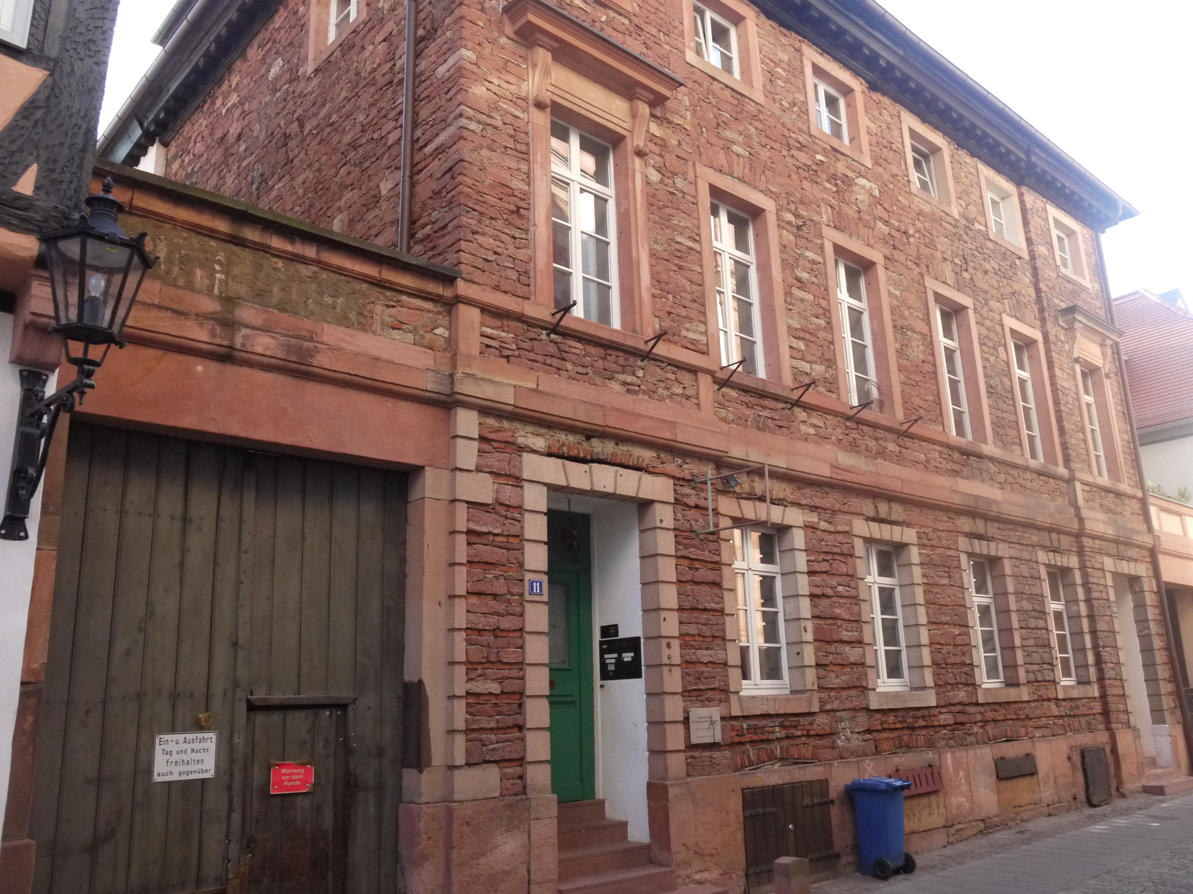 Metzgergasse 11 und 13, "Zum Greif(f)enstein, Wohnhaud des Schlossbaumeisters Georg Ridinger, denkmalgeschütztes Gebäude in Aschaffenburg